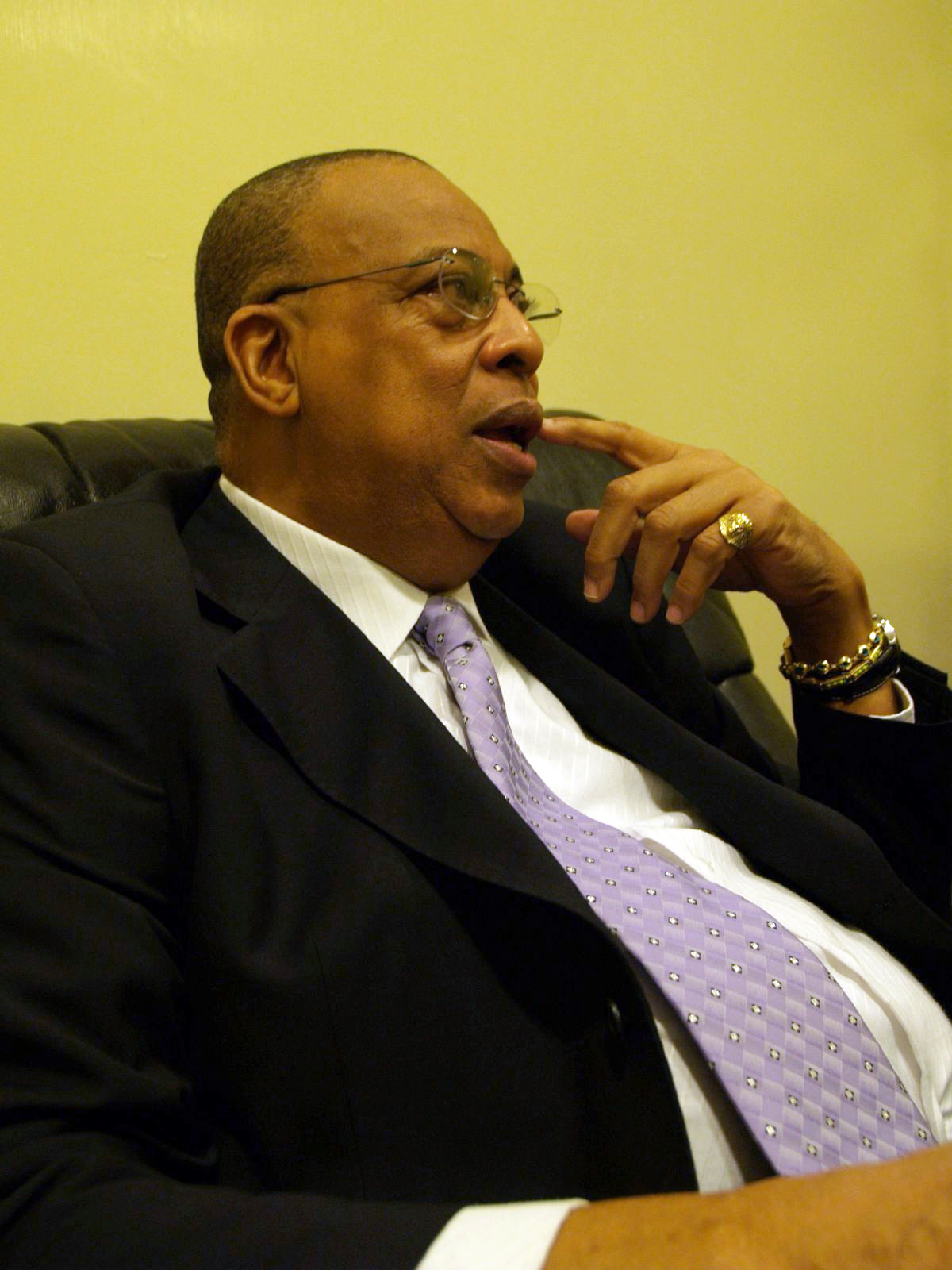 Chucho Valdes